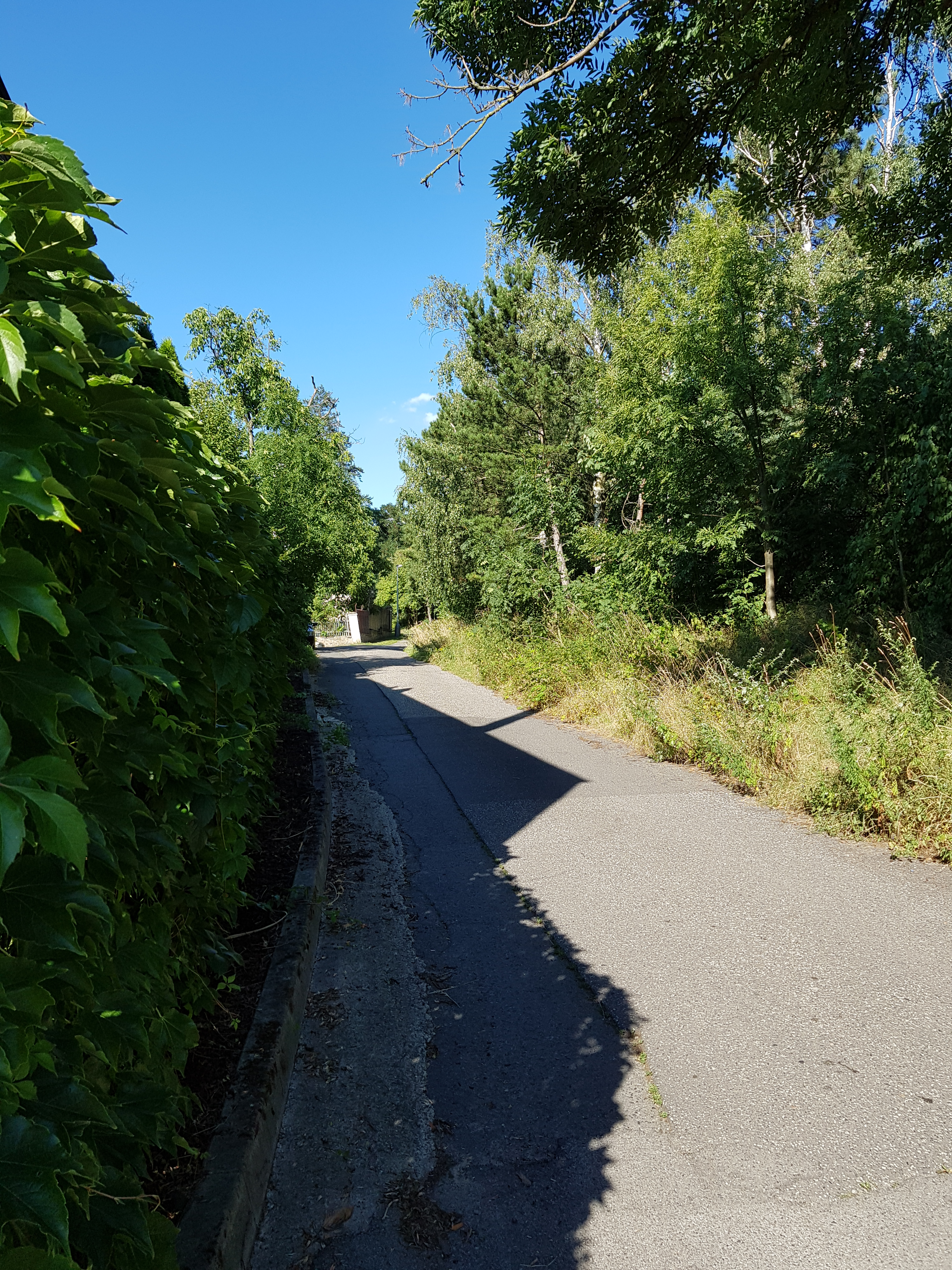 Hostavická ulice, Praha 14-Hloubětín, pohled od Kyjské směrem na východ